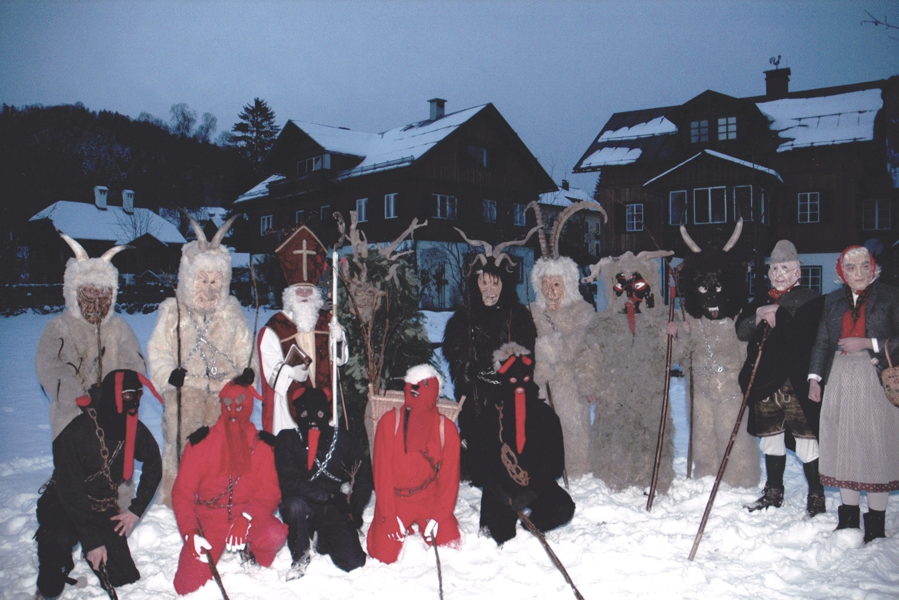 Die Altausseer "Miglon" (Krampusse) der "Schretthaus-Miglon"-Pass